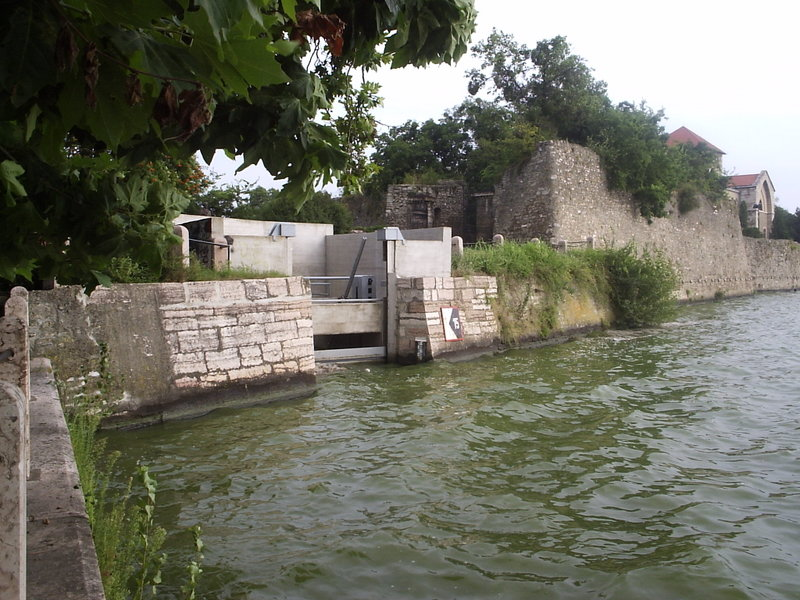 Lake Oreg-to, Hungary